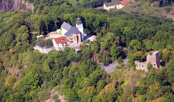 Luftaufnahme von Remigiusbergkirche und Michelsburg